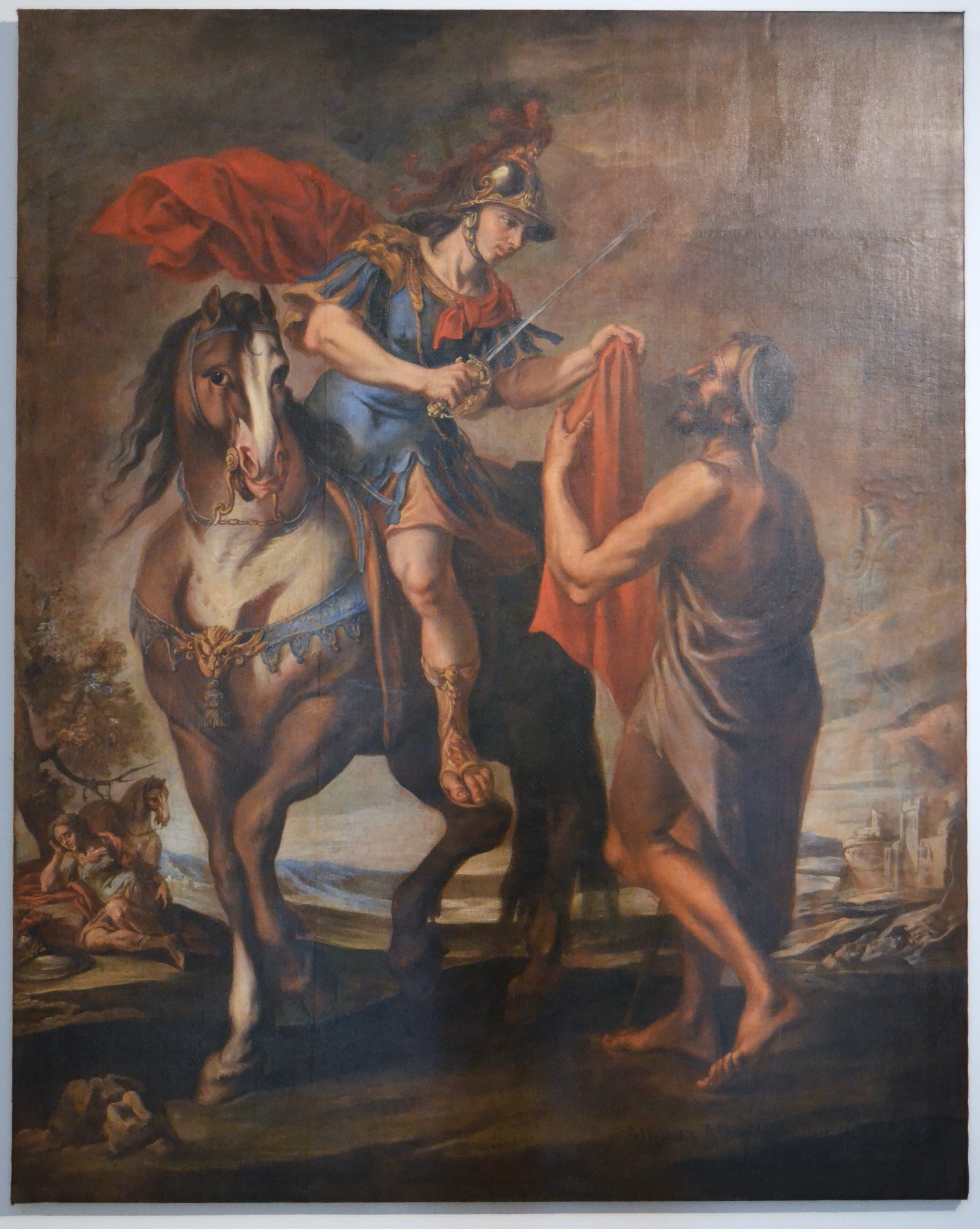 La obra representa a San Martín de Tours repartiendo su capa, que cortó por la mitad, con un pobre.